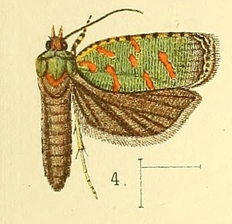 Accra viridis